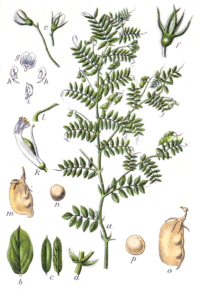 Lens culinaris Medik., syn. Vicia lens (L.) Cosson & Germ. Original Caption Linse, Vicia lens